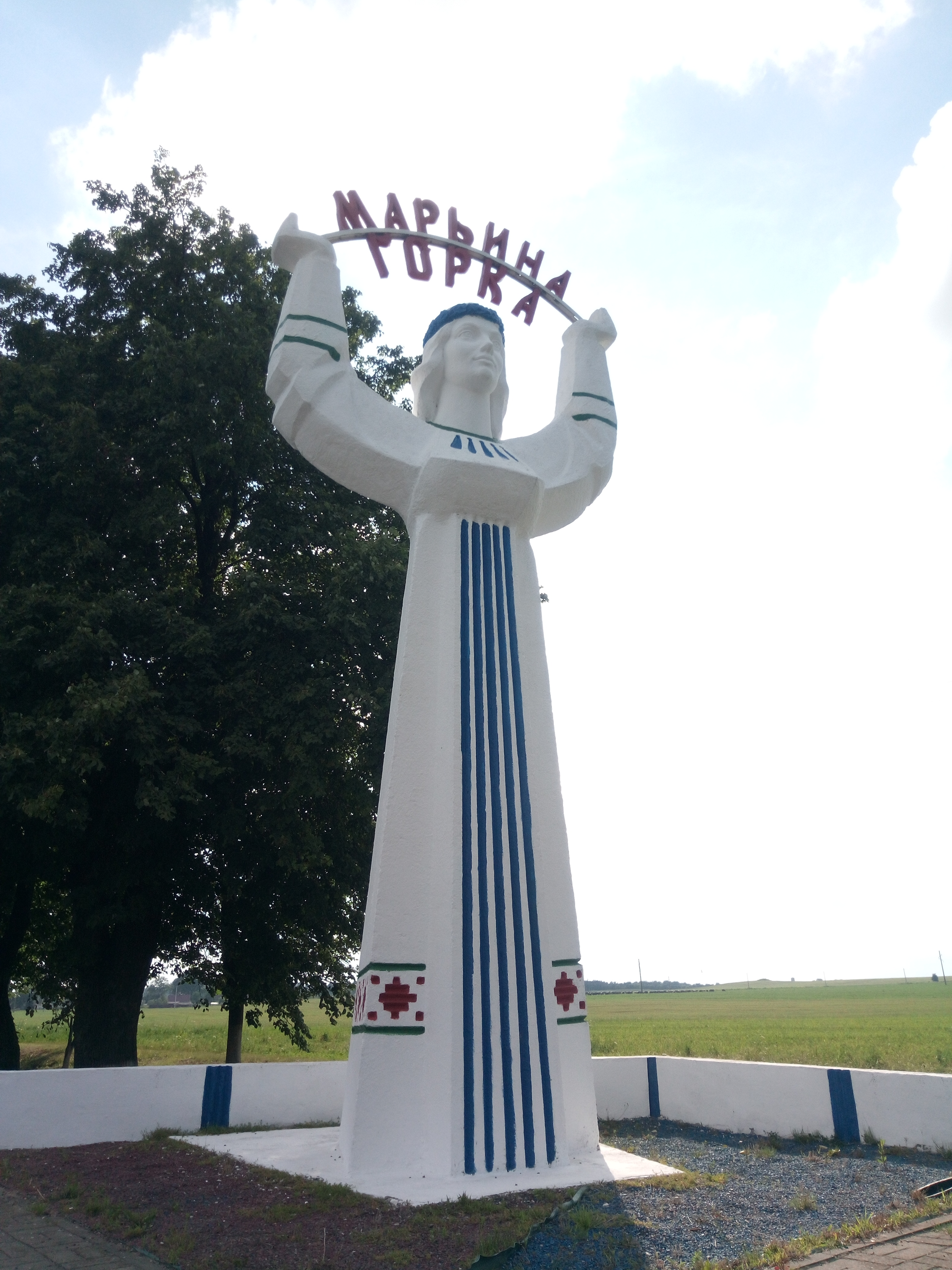 Статуя Мар'і